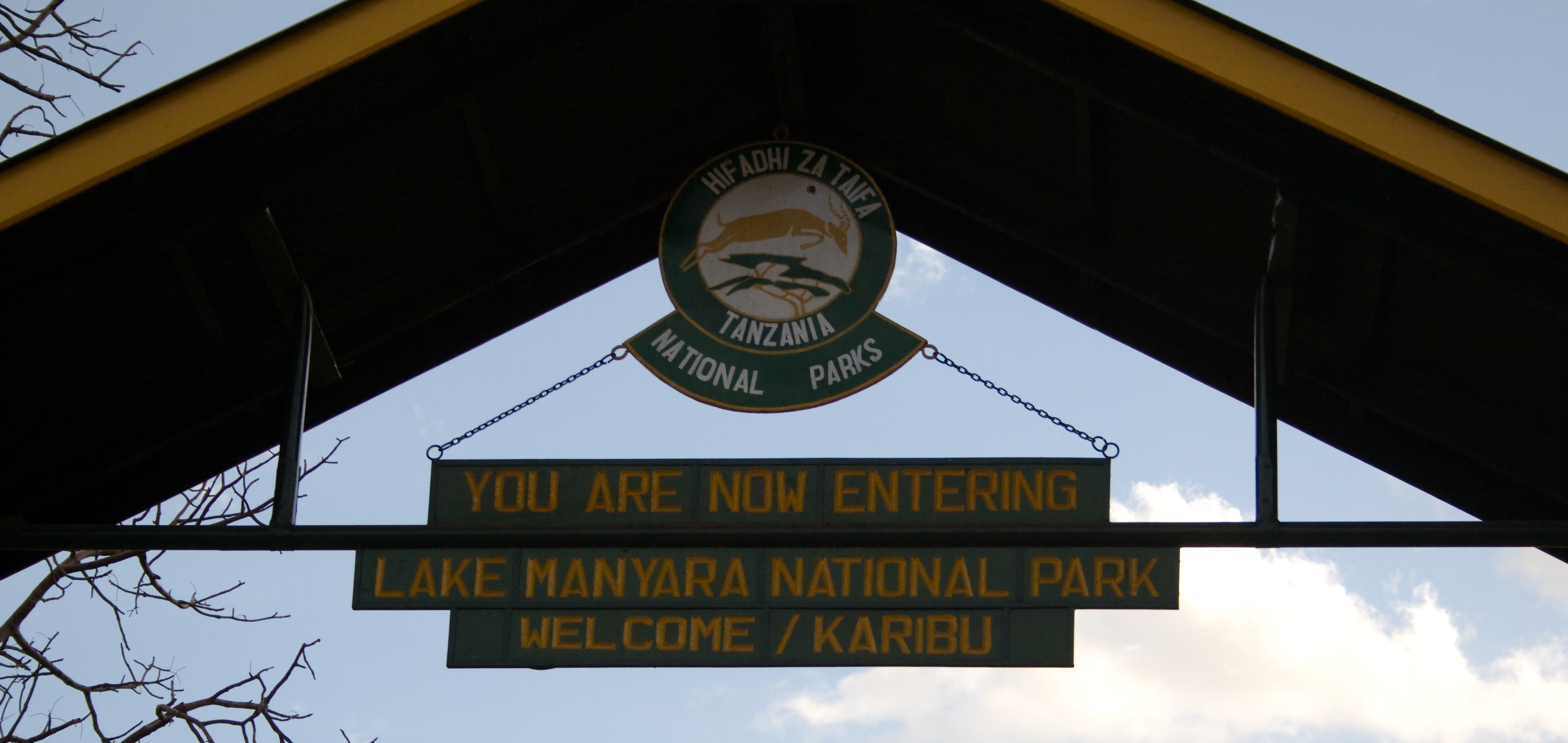 Lake Manyara national park, Tanzania